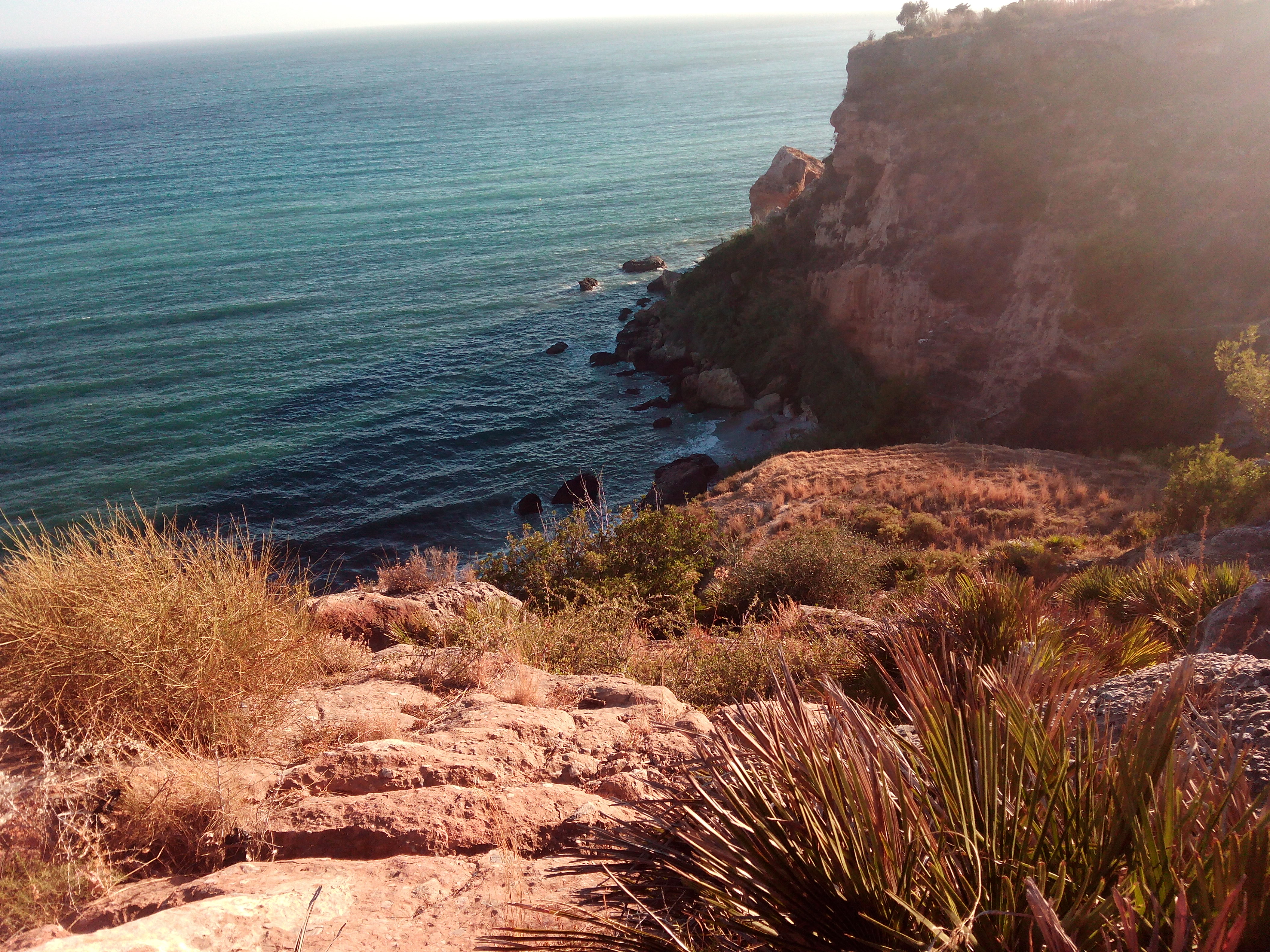 Foto desde la altura del Barranco de Maro, en la imagen podemos ver un trozo de la pequña cala.